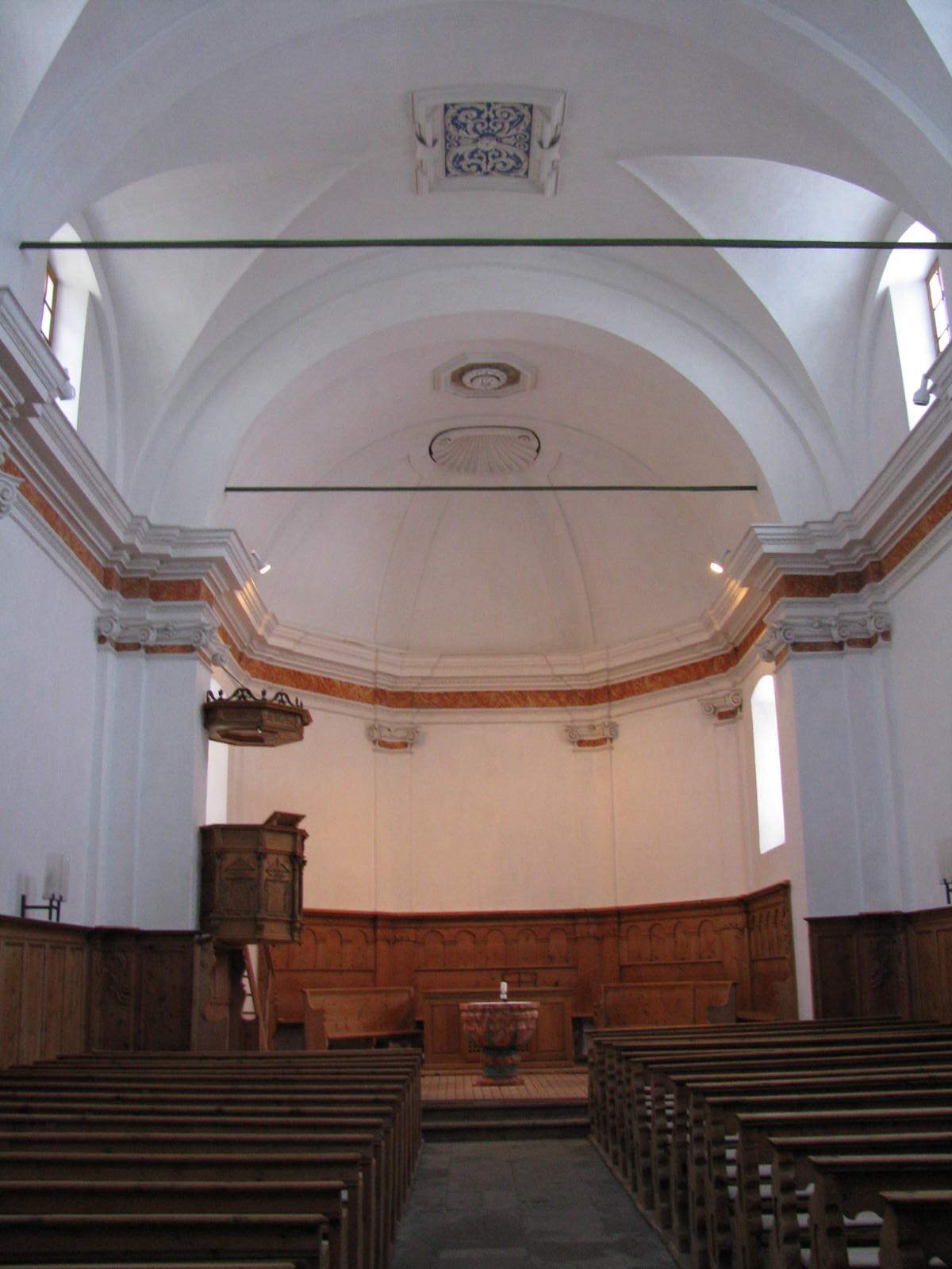 Innenansicht der reformierten Kirche Bel Taimpel in Celerina, Kanton Graubünden